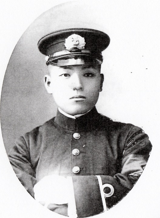 市岡寿海軍中将